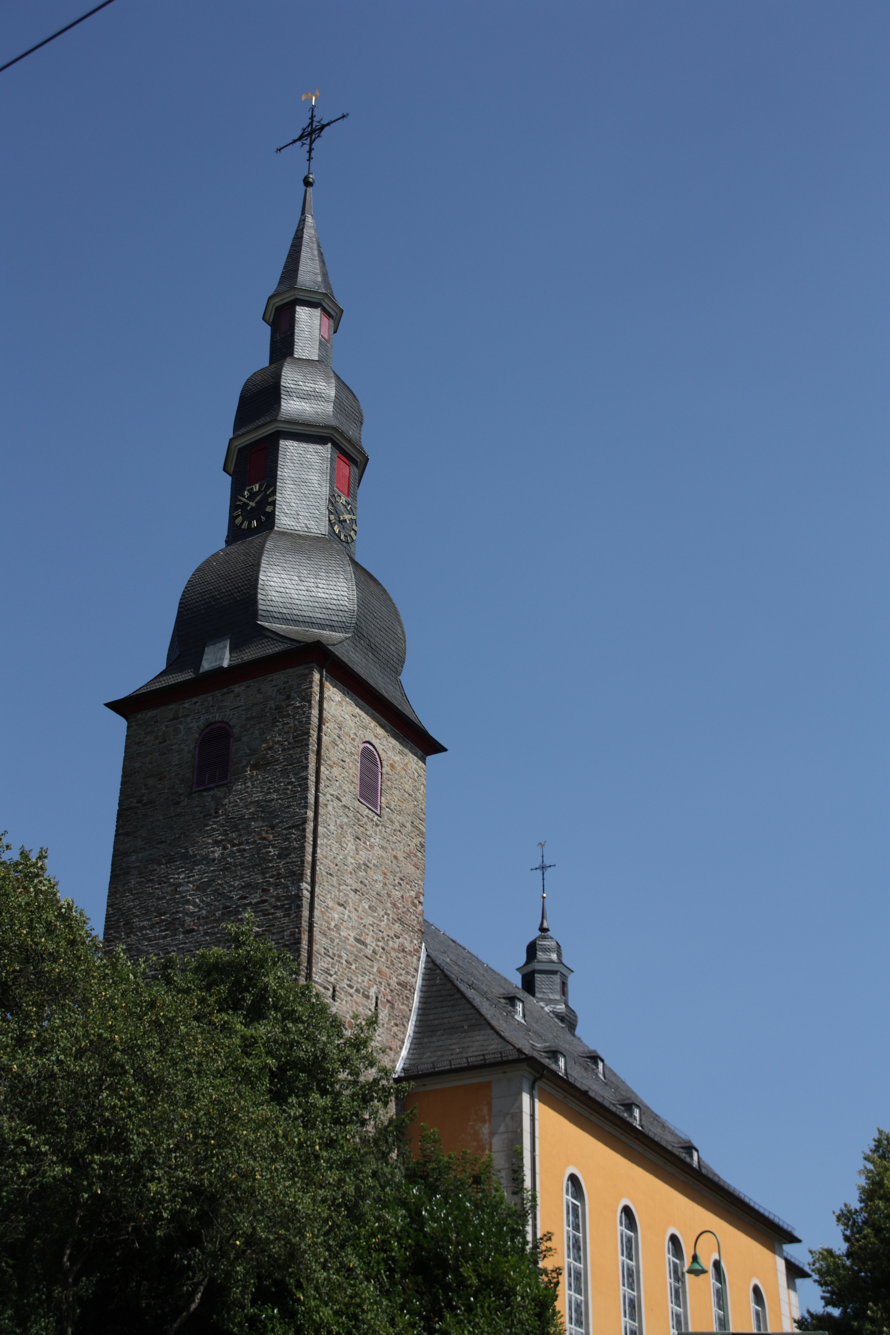 Barockkirche in Eckenhagen